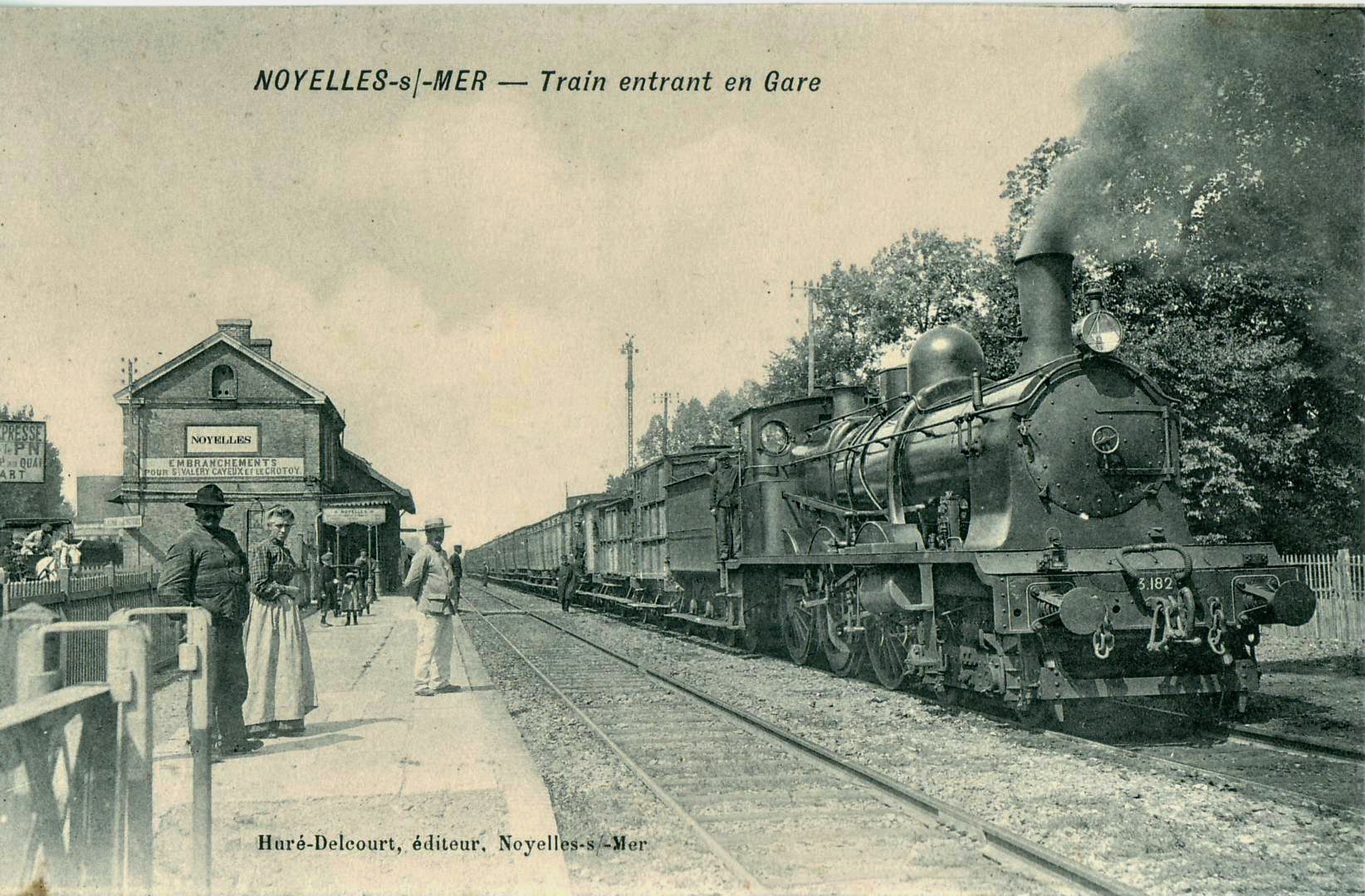 Caret postale ancienne éditée par Huré-Delcourt à Noyelles-sur-Mer NOYELLES-s/-Mer : Train entrant en gare Gros plan sur la locomotive de la Compagnie du Nord N° 3.182 (série des 230 Nord 3.078 à 3.354)